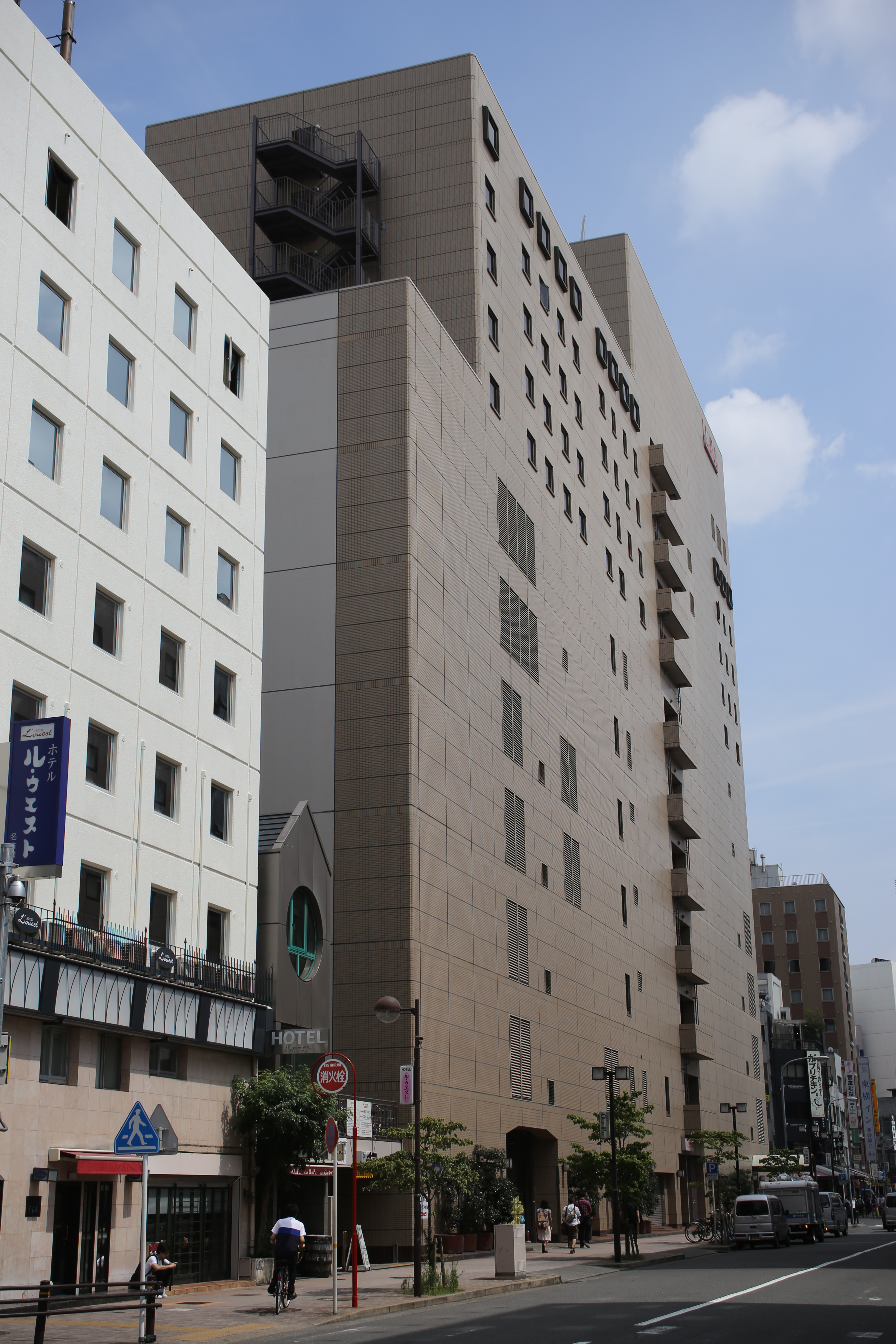 名古屋市中村区椿町のニッセイ名古屋駅西ビルを西側公道北側より撮影